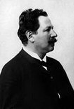 Adolf Čech (1842–1900), direttore d'orchestra ceco